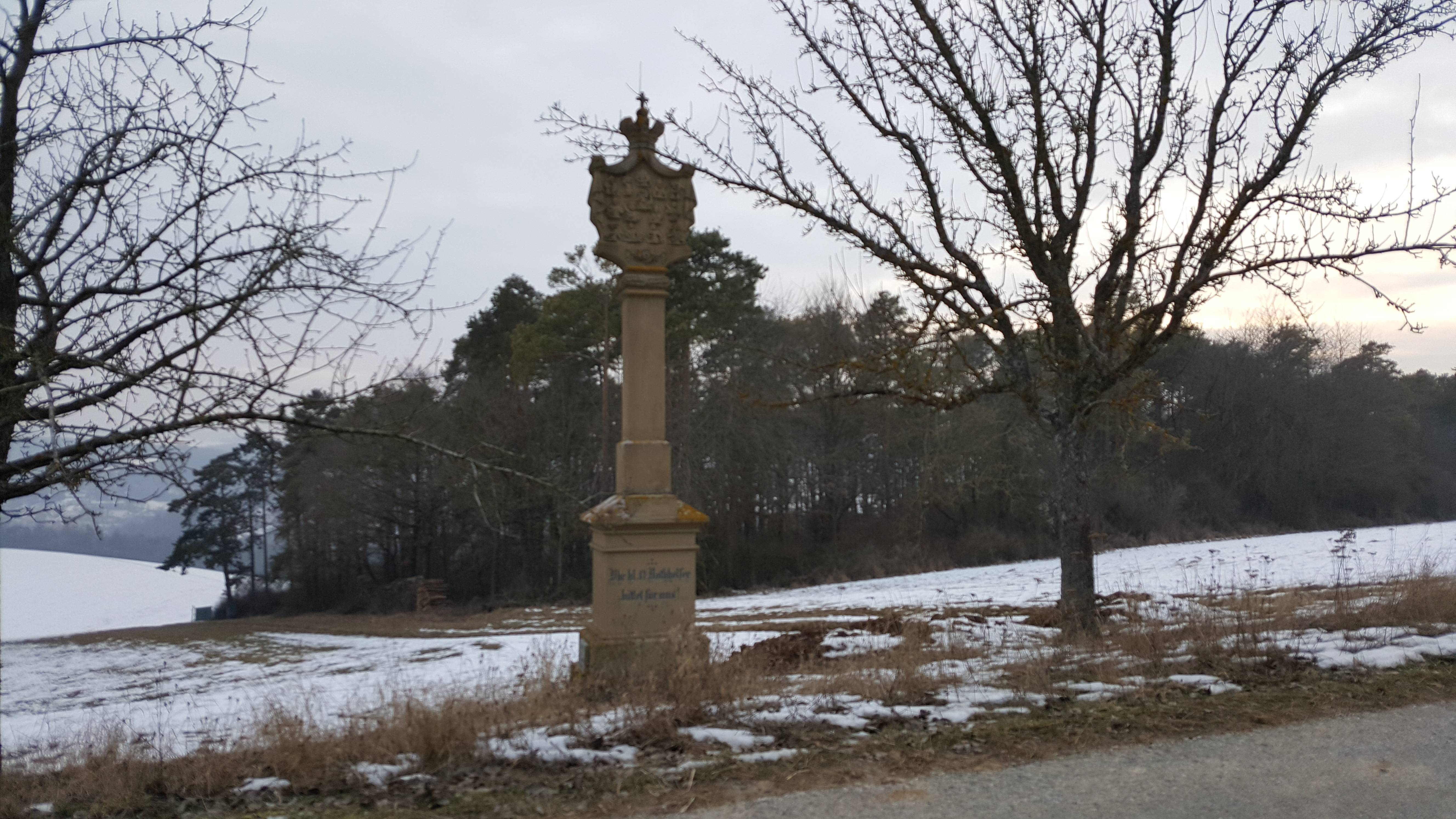 Bildstock an der Frombergstraße